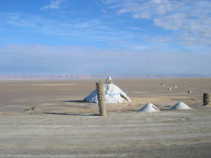 Sel récolté à la surface du Chott el-Jérid (photographie personnelle prise en décembre 2004).